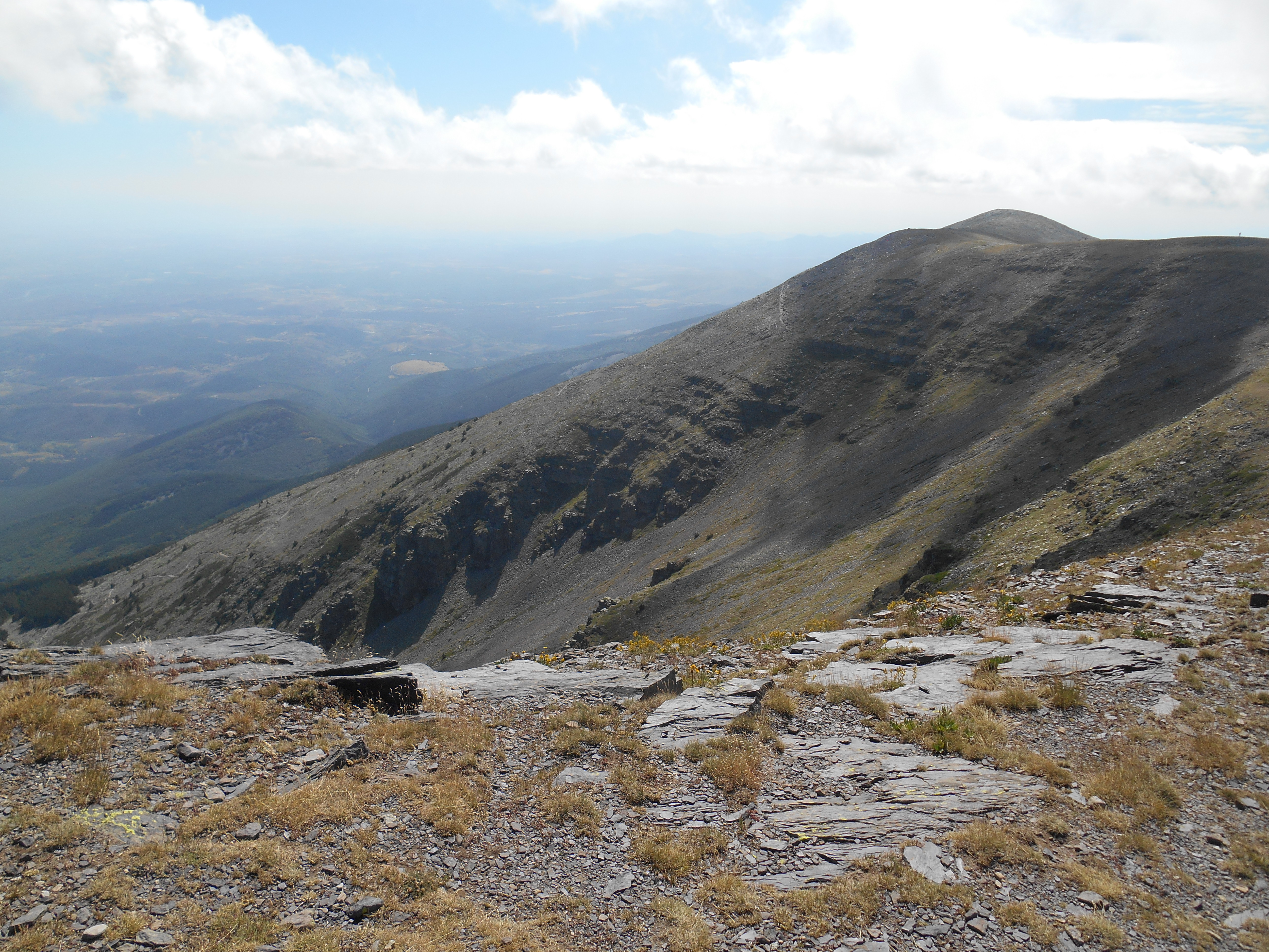 Aragonés: Cul de Sant Gaudioso, Parque Natural de Moncayo